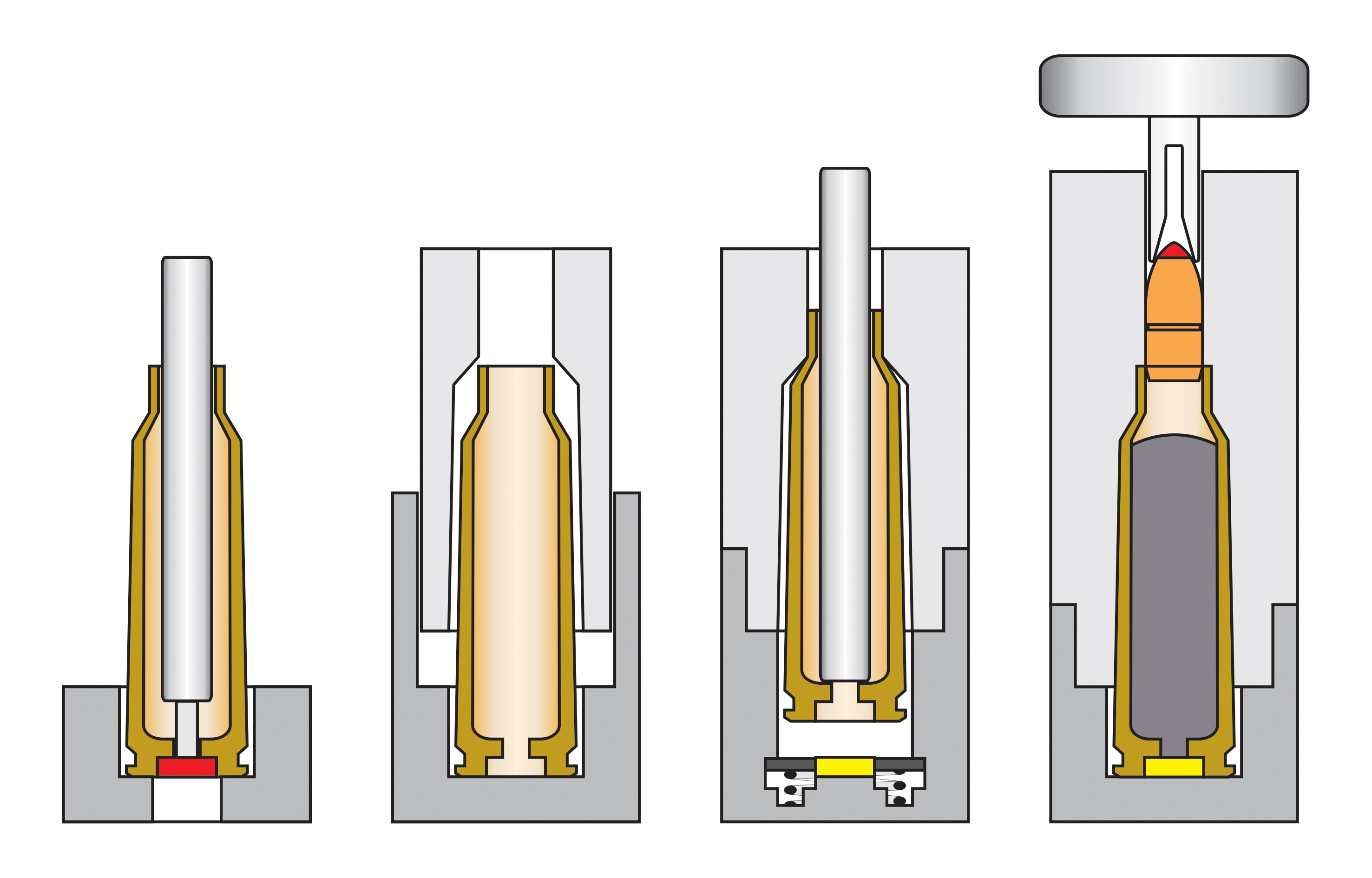 matryce ręczne